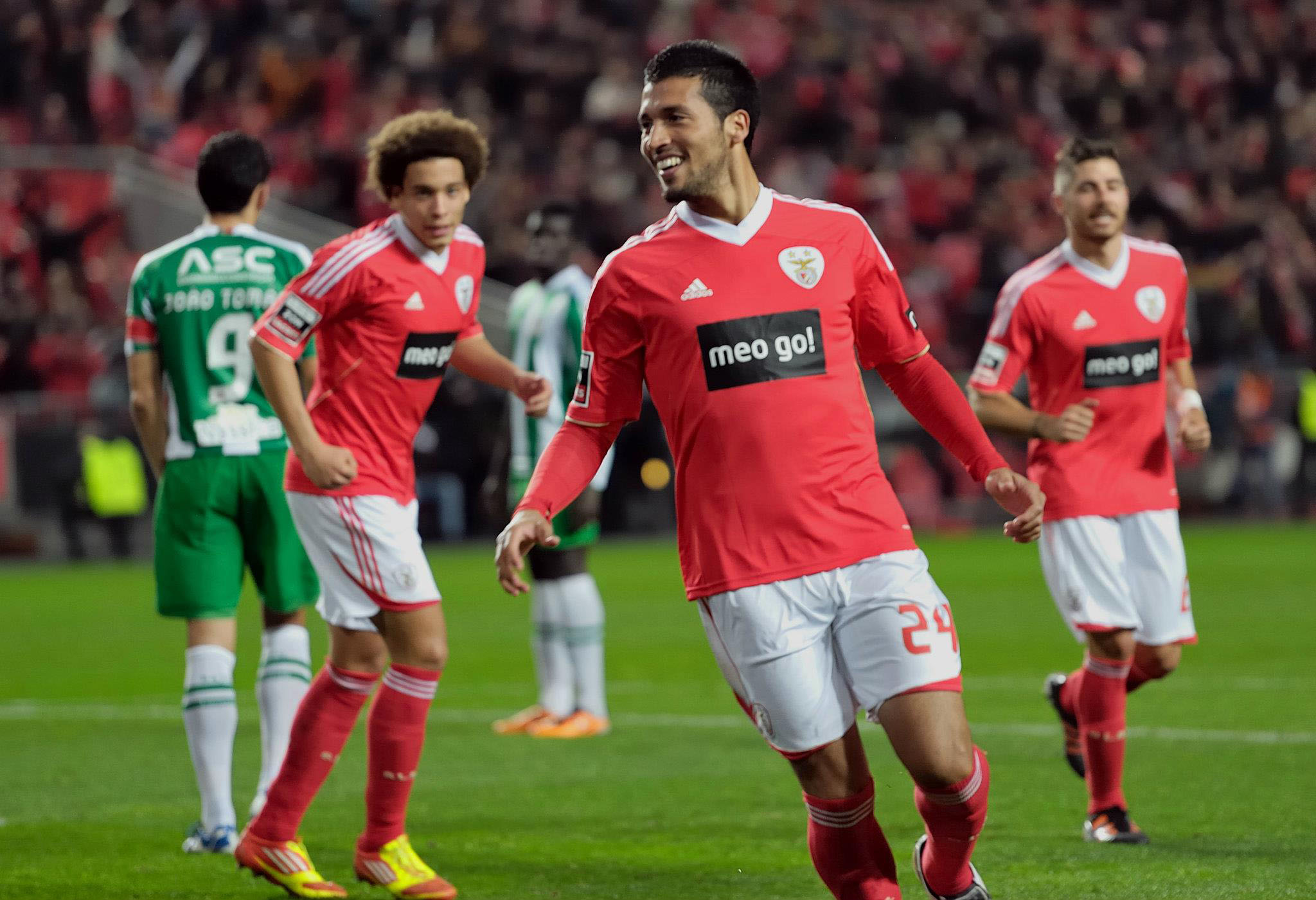 Ezequiel Garay